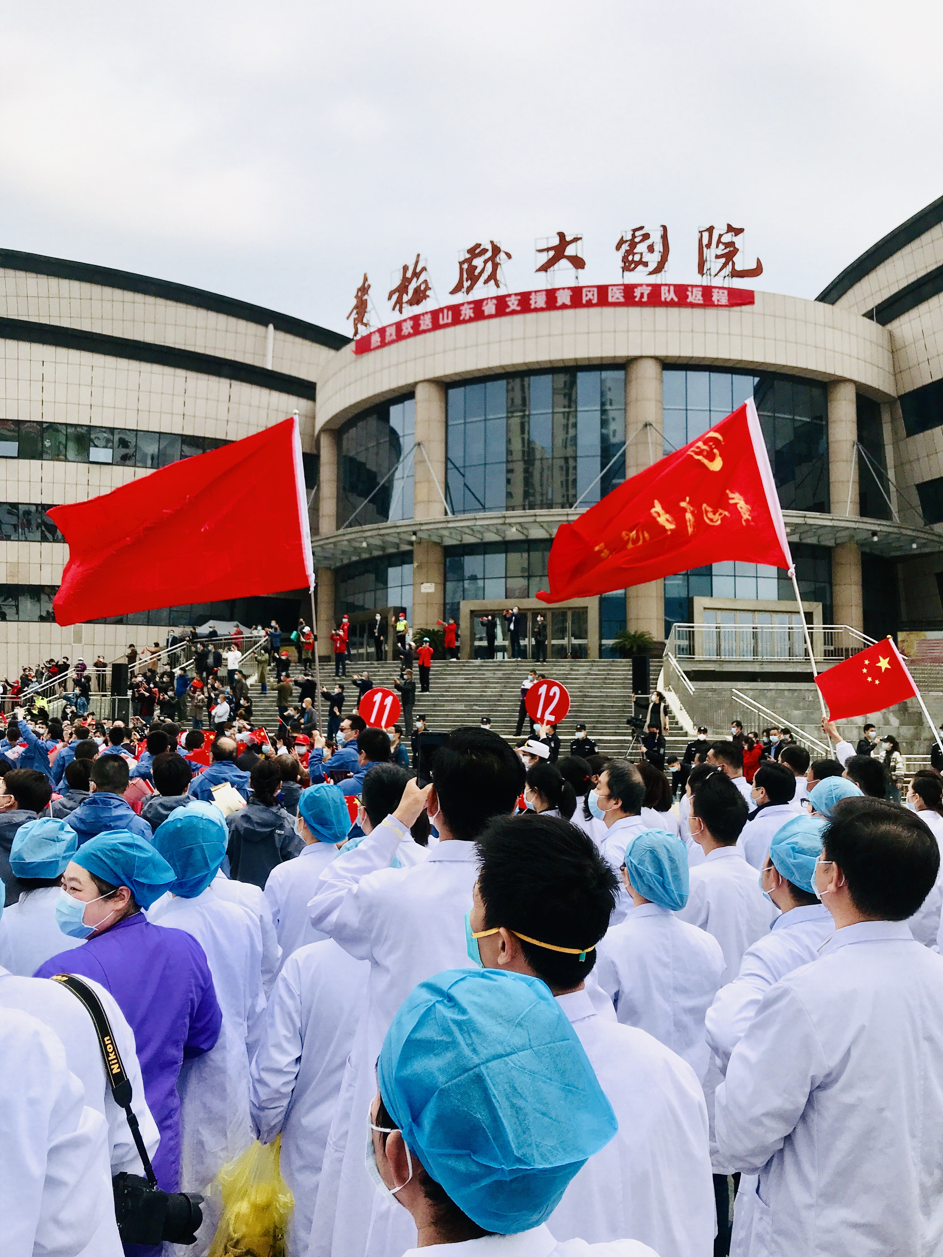 2020-3-20 黄冈送别山东援鄂医疗队 黄梅戏大剧院